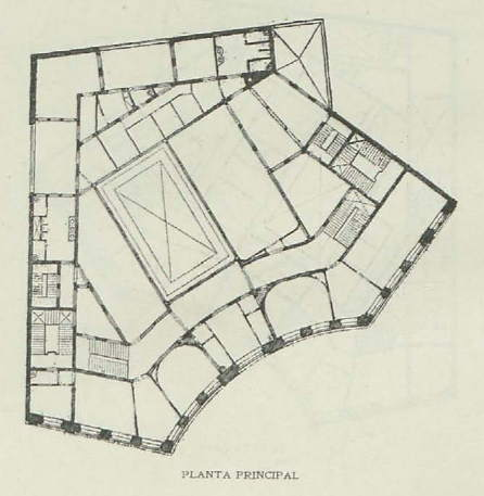 Plano del proyecto original del edificio del Banco Hispano-Americano. Planta principal